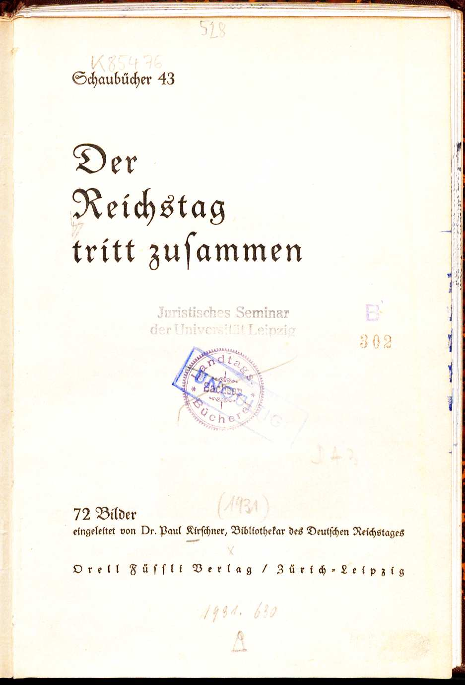 Schaubücher 43 Der Reichstag tritt zusammen 1931 Titel